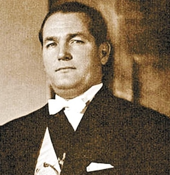 Toma de posesión Arévalo